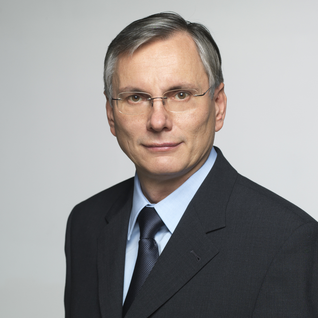 Alois Stöger